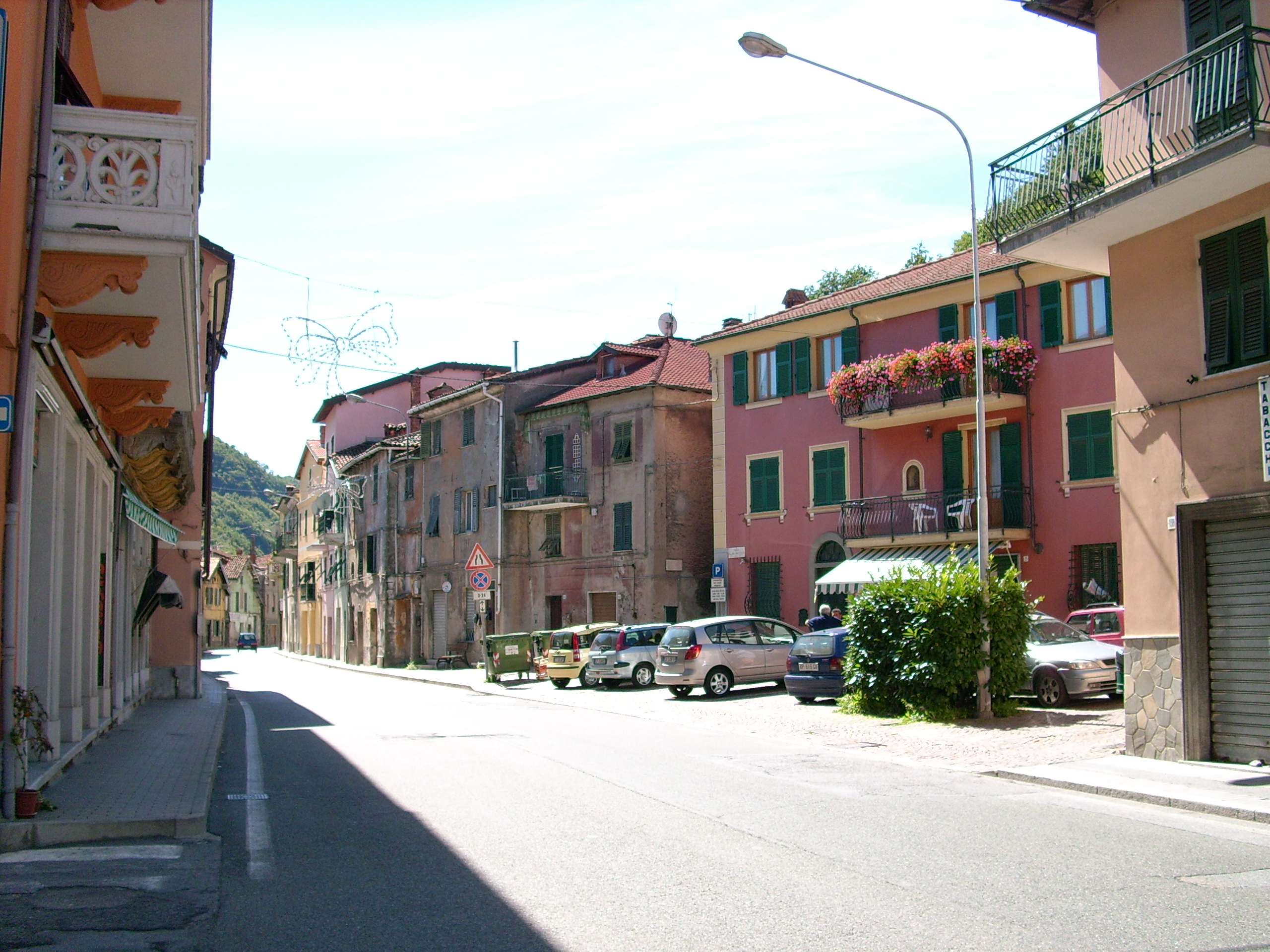 Isola del Cantone, Liguria, Italia